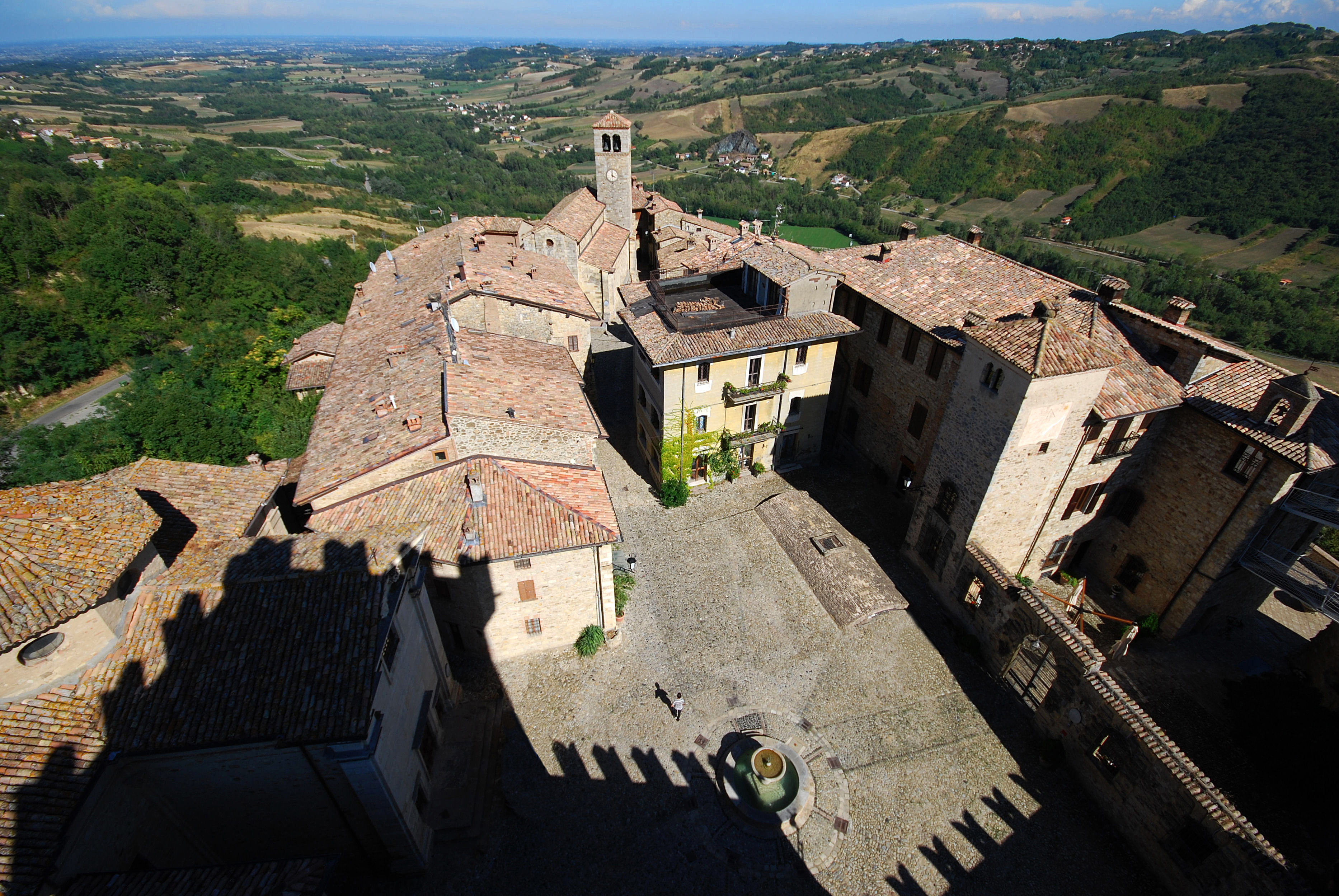 Mastio e Borgo di Vigoleno - MIBAC This is a photo of a monument which is part of cultural heritage of Italy.